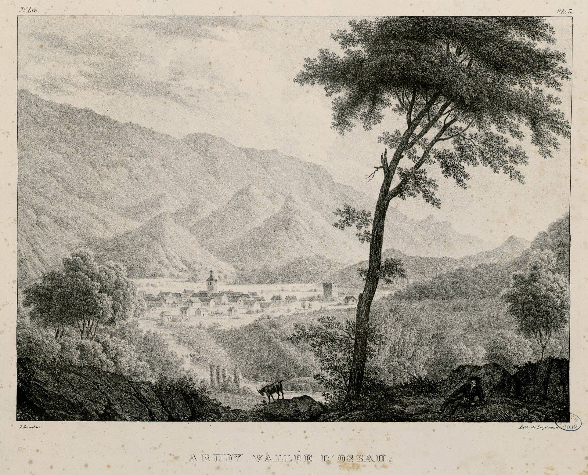 Titre imprimé, suivi du texte, et page de titre lithographiée avec vignette intitulée Pont de Sia. - 24 planches et 1 tableau récapitulatif de la hauteur des principales montagnes des Pyrénées françaises, lithographiés par Engelmann d'après J. Jourdan. Ouvrage paru en 6 livraisons de 1828 à 1830. Les planches sont réliées dans le désordre : chacune porte l'indication de la livraison et un numéro de planche (sauf dans la 1ere livraison) Demi-rel. veau, pièce de titre doré sur plat supérieur Ex libris ms. (p. de titre) : Mary Sinclair ...Σ?] Ancely, René (1876 - 1966). Possesseur